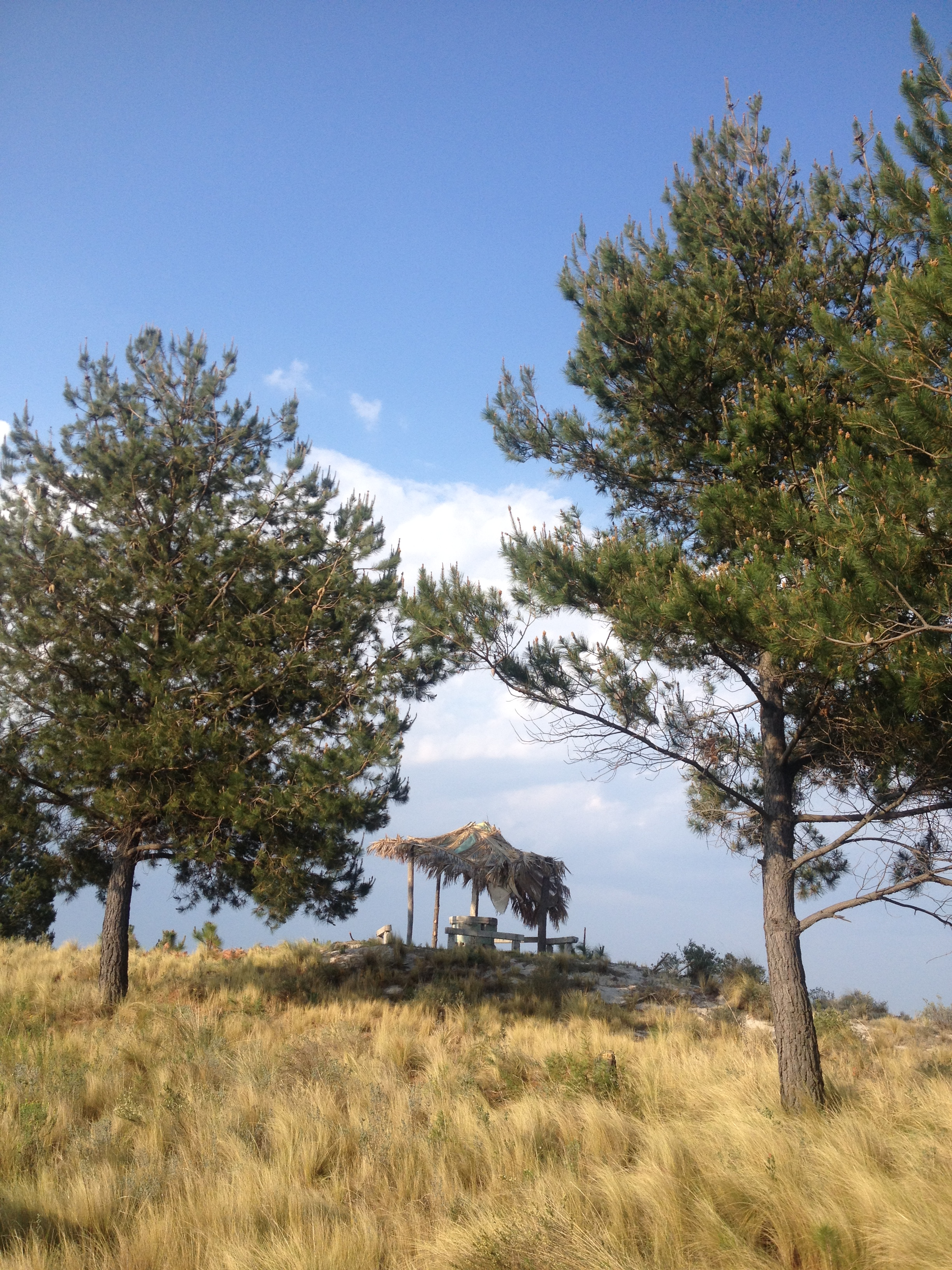 Cima del Cerro Xalapasco